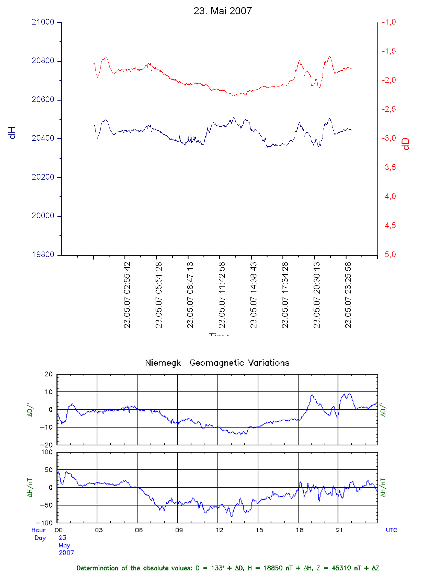 Vergleich der Messung des SAMs Bamberg mit der INTERMAGNET-Station in Niemegk